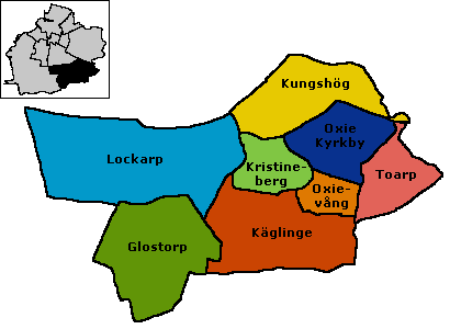 Oxies delområden. Karta skapad av Tsujigiri den 16/10 2005.